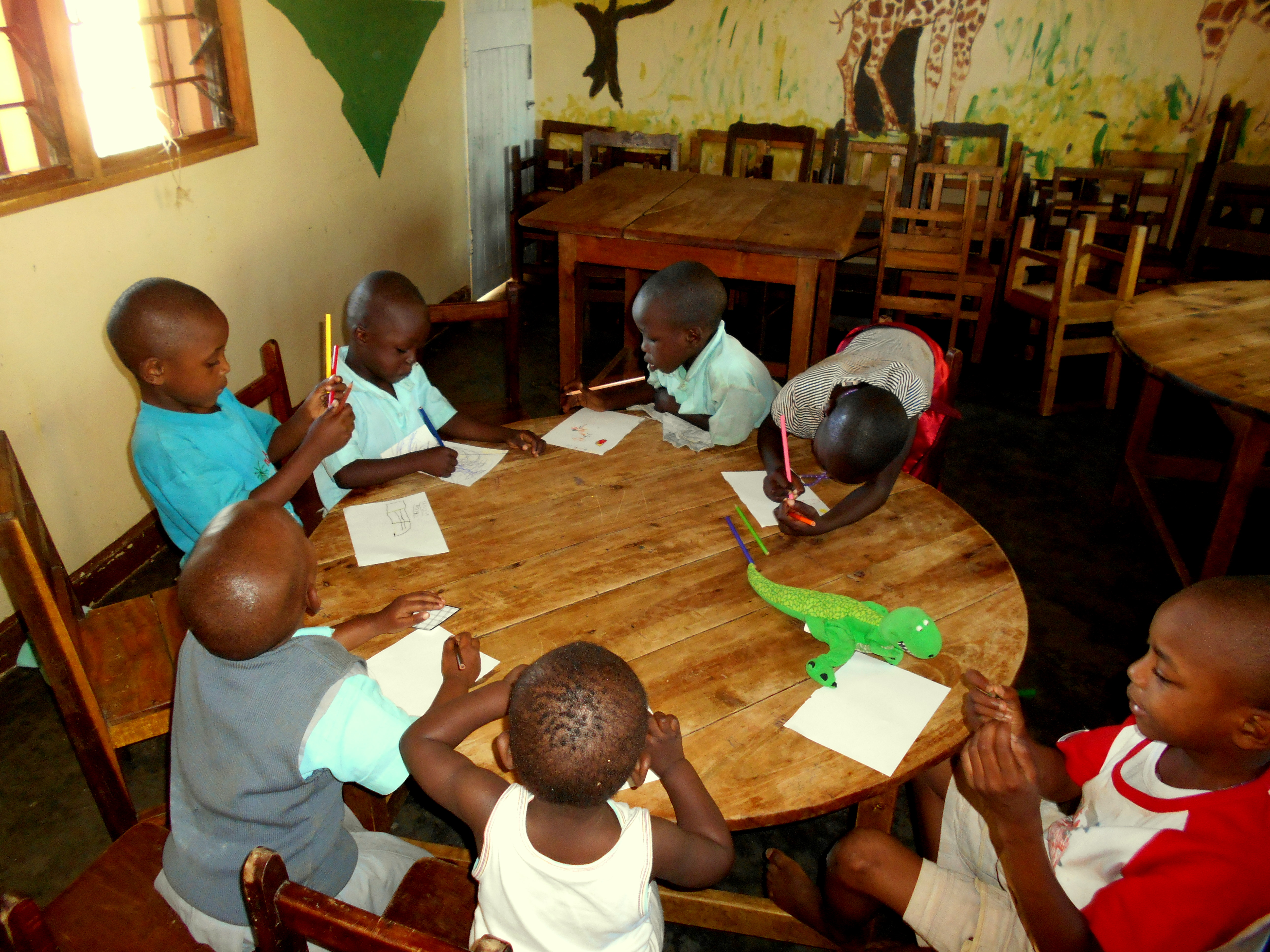 Tanulás a Kicsi Angyalok Óvodában, Bura Mission faluban, Coast, Kenya